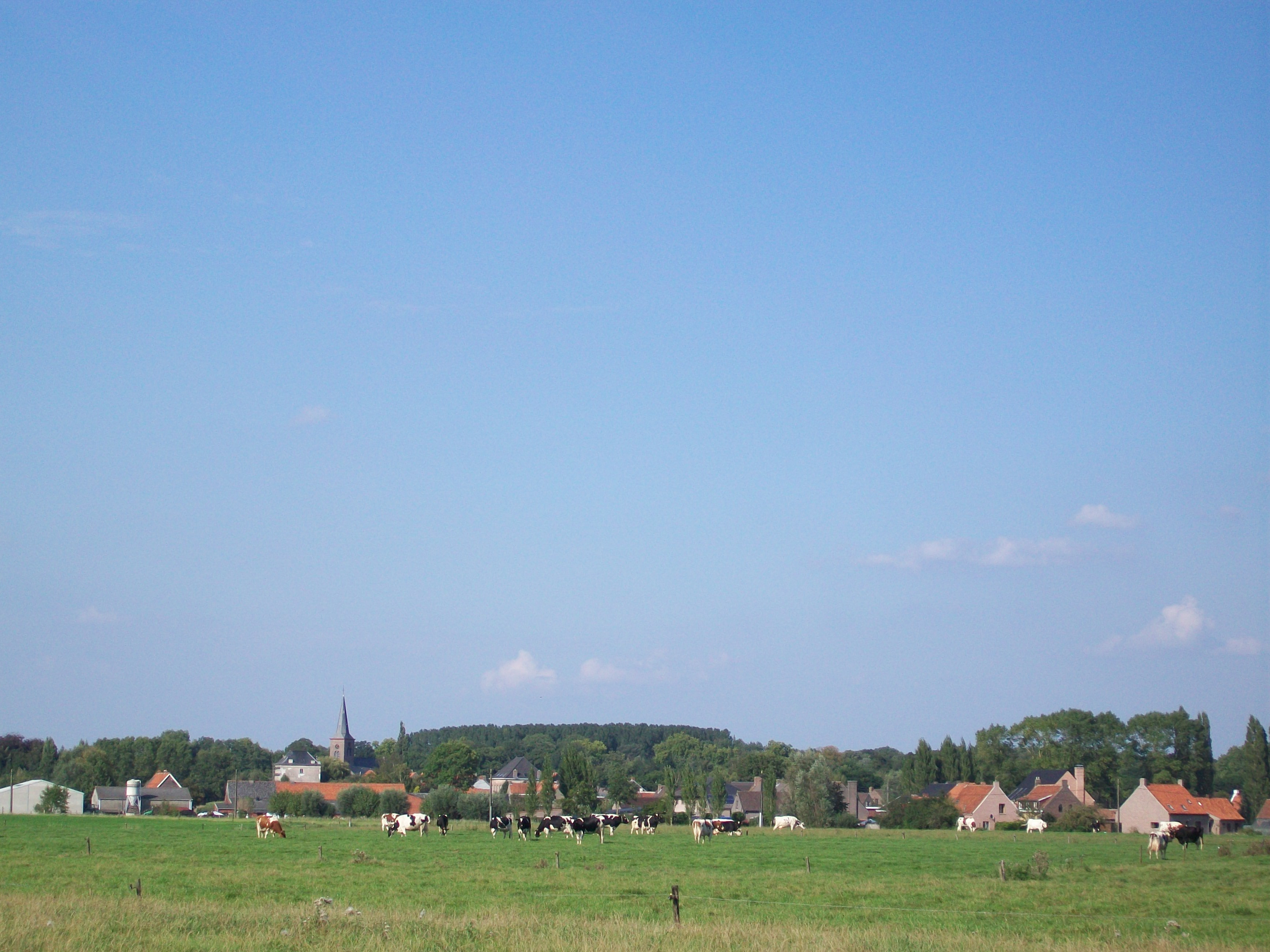 Dorpsgezicht van Poeke anno 2011